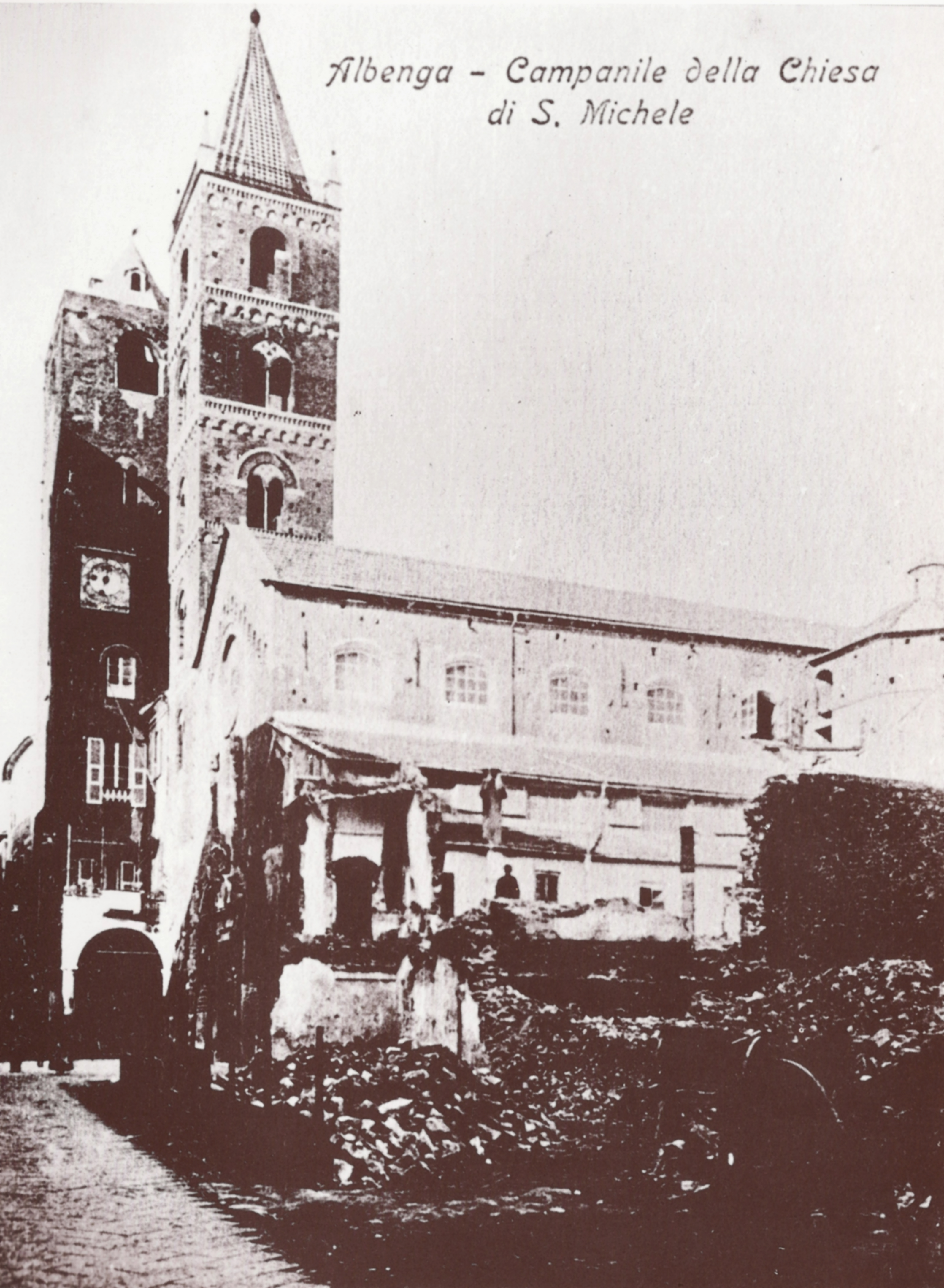 Demolizione del chiostro di collegamento tra la chiesa di Santa Maria in Fontibus e la cattedrale, per far spazio alla piazza IV Novembre.